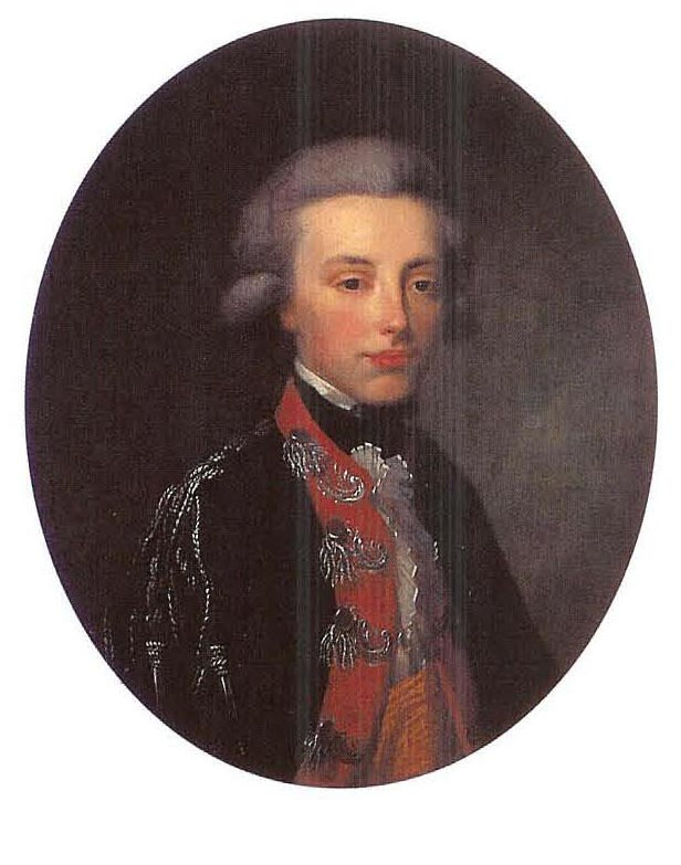 Portret van Prins Frederik, zoon van stadhouder Willem V. Dit portret is vervaardigd omstreeks 1790 en het auteursrecht dus begrijpelijkerwijs allang verlopen. Afbeelding komt in meerdere publicaties voor.